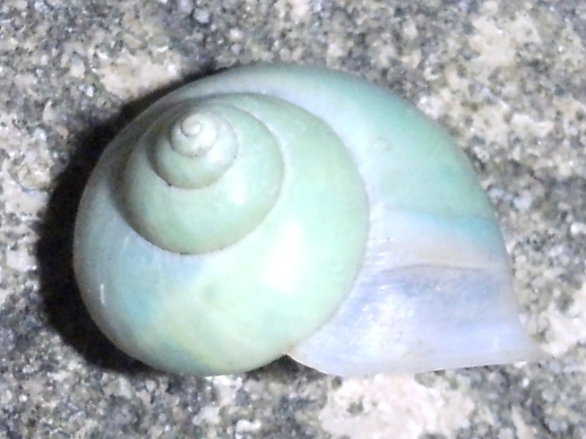 アオミオカタニシ（ヤマタニシ科）。沖縄県宜野湾市の公園で撮影。Leptopoma perlucida (Grateloup, 1840) (synonym: Leptopoma nitidum (Cyclophoridae) at park of Ginowan City, Okinawa, Japan.